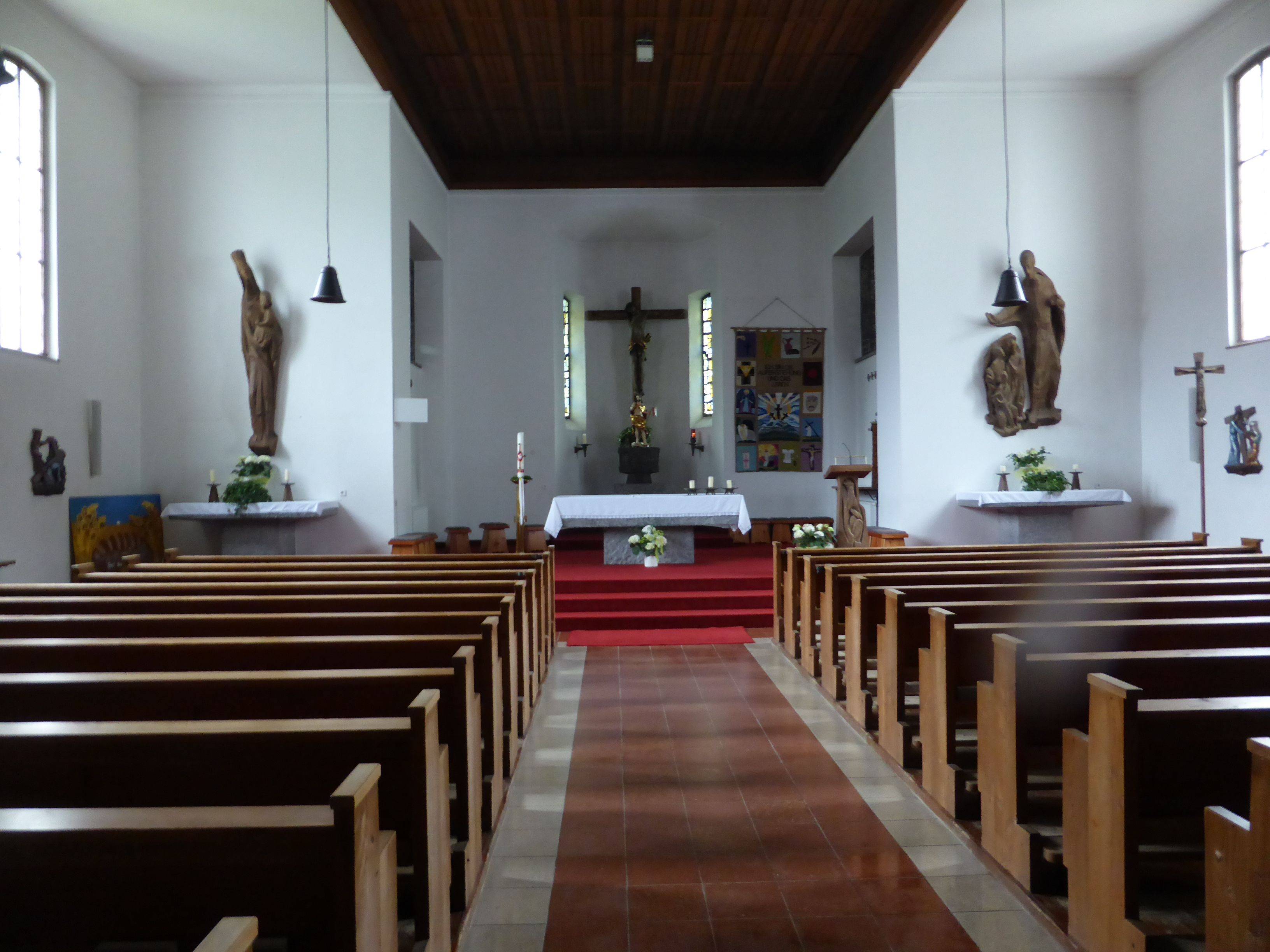 Kath. Pfarrkirche hl. Maria